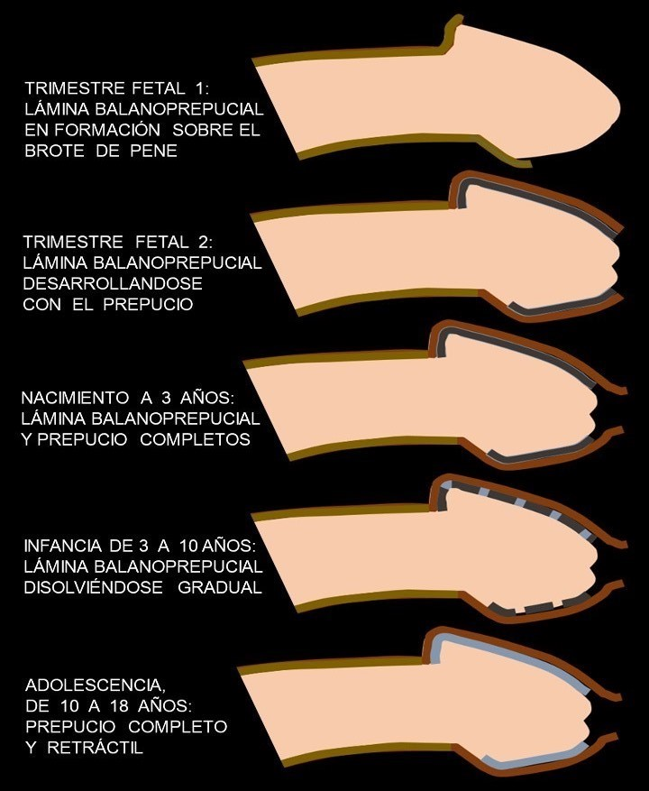 Desarrollo del prepucio por edad, aunque en en últimas décadas los neonatos vienen bien formado y aderido al glande, el cual parece ser que se está separando más rápido. Imagen hecha a partir de File:Reatracionprepucio.jpg, subido por Imaginativo